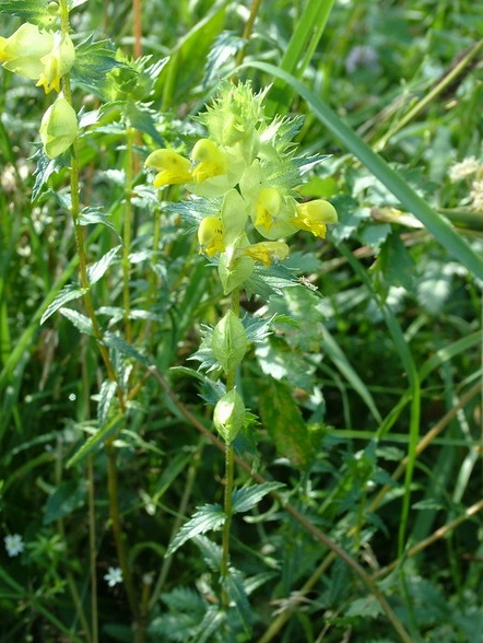 Szelężnik większy